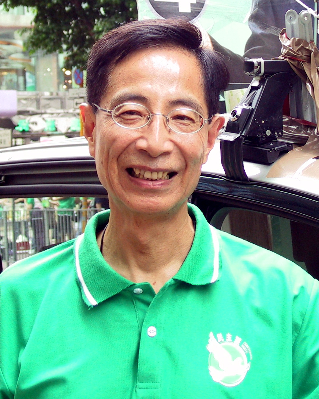 Martin Lee, Hong Kong legislator, from 2004 campaign, by Andrew Lih